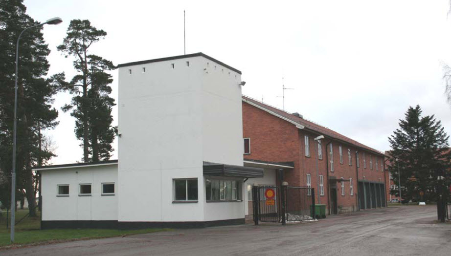 Vaktkasern vid före detta Västgöta flygflottilj (F 6) i Karlsborg. Vaktkasernen är uppförd 1939 och den norra delen av byggnaden utgörs av modernistiskt präglad byggnad i vit puts. Den är delvis byggd i två våningar och har ett karaktäristiskt fönsterband åt väster. I bottenvåningen finns vaktrum samt kontorsrum medan den högre delen utgörs av ett larmtorn. Sammanbyggd med vaktkasernen är en mer traditionellt utformad tegelbyggnad som bland annat inrymde en brandstation med ett slangtorn av trä åt öster, sadeltak och fyrdelade korspostfönster. Denna byggnad har samma karaktär som flottiljens matsal, uppförd några år senare.